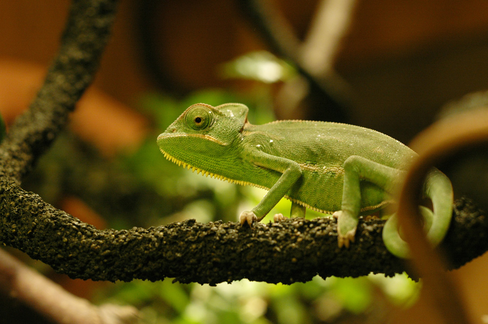 kameleont yemen